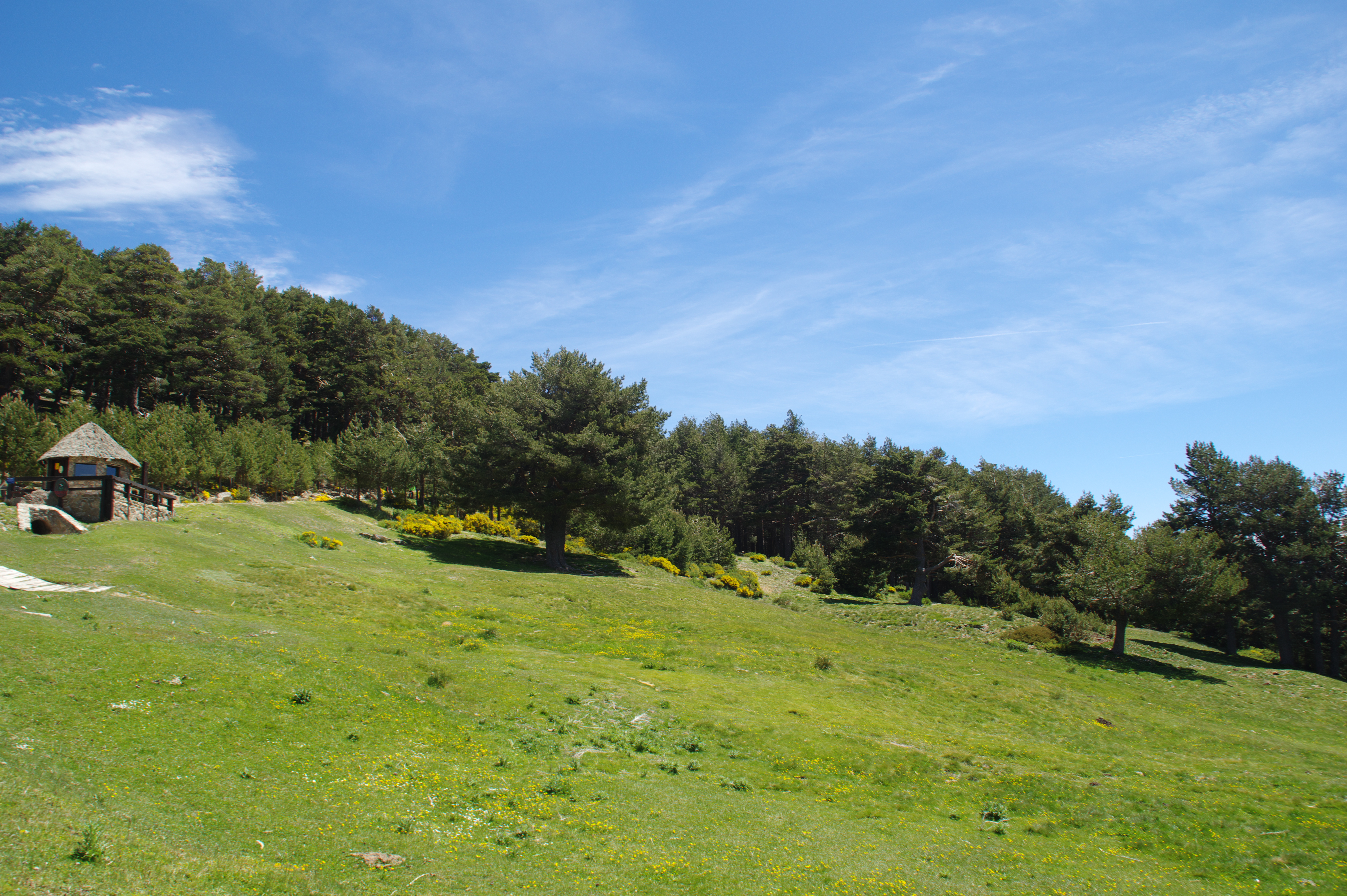 ®s K3 SD Ð ┼ MADRID PEÑALARA según KATRESYA